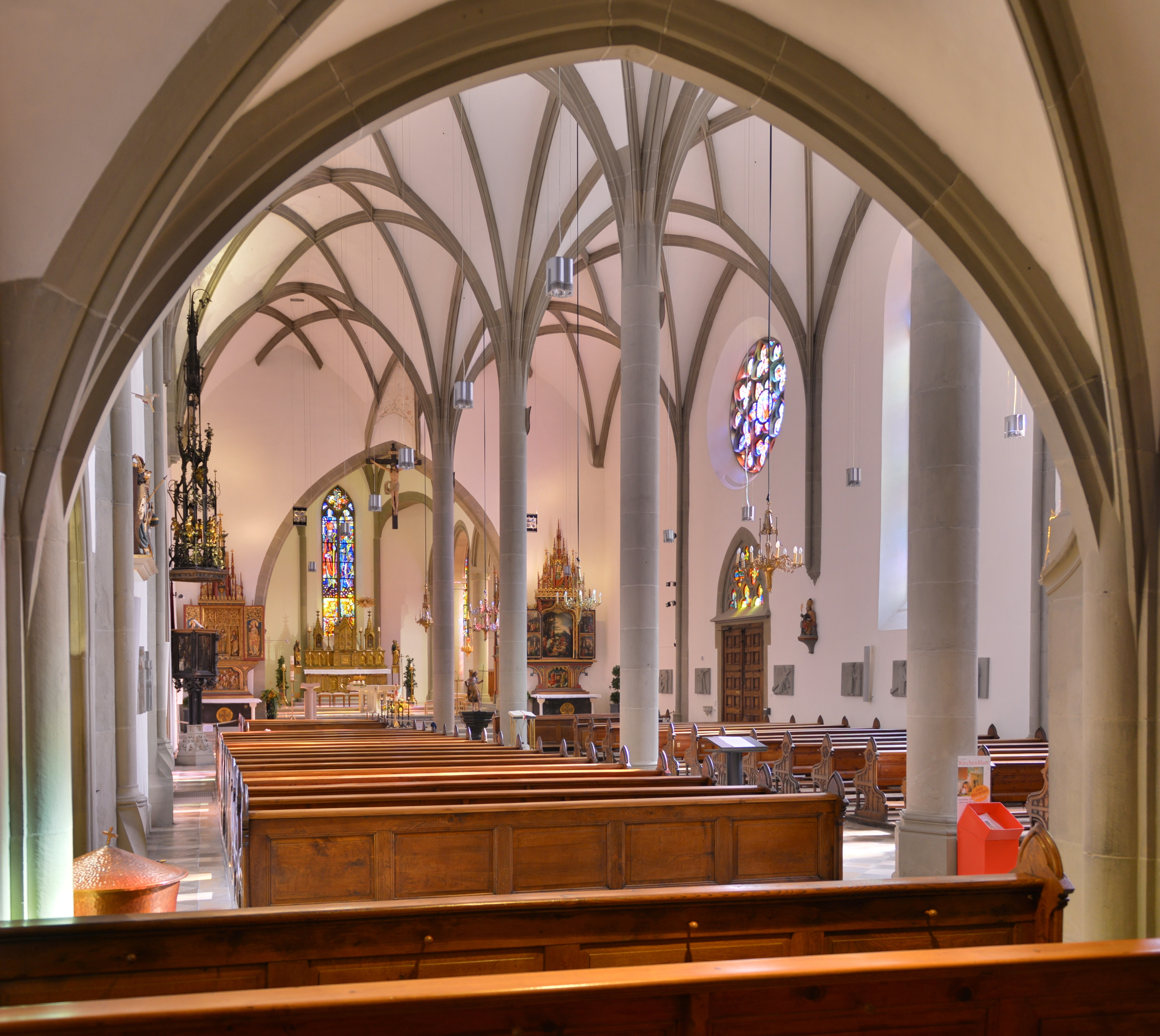 Dom St. Nikolaus (Feldkirch) am Domplatz Nr.2 in Feldkirch.